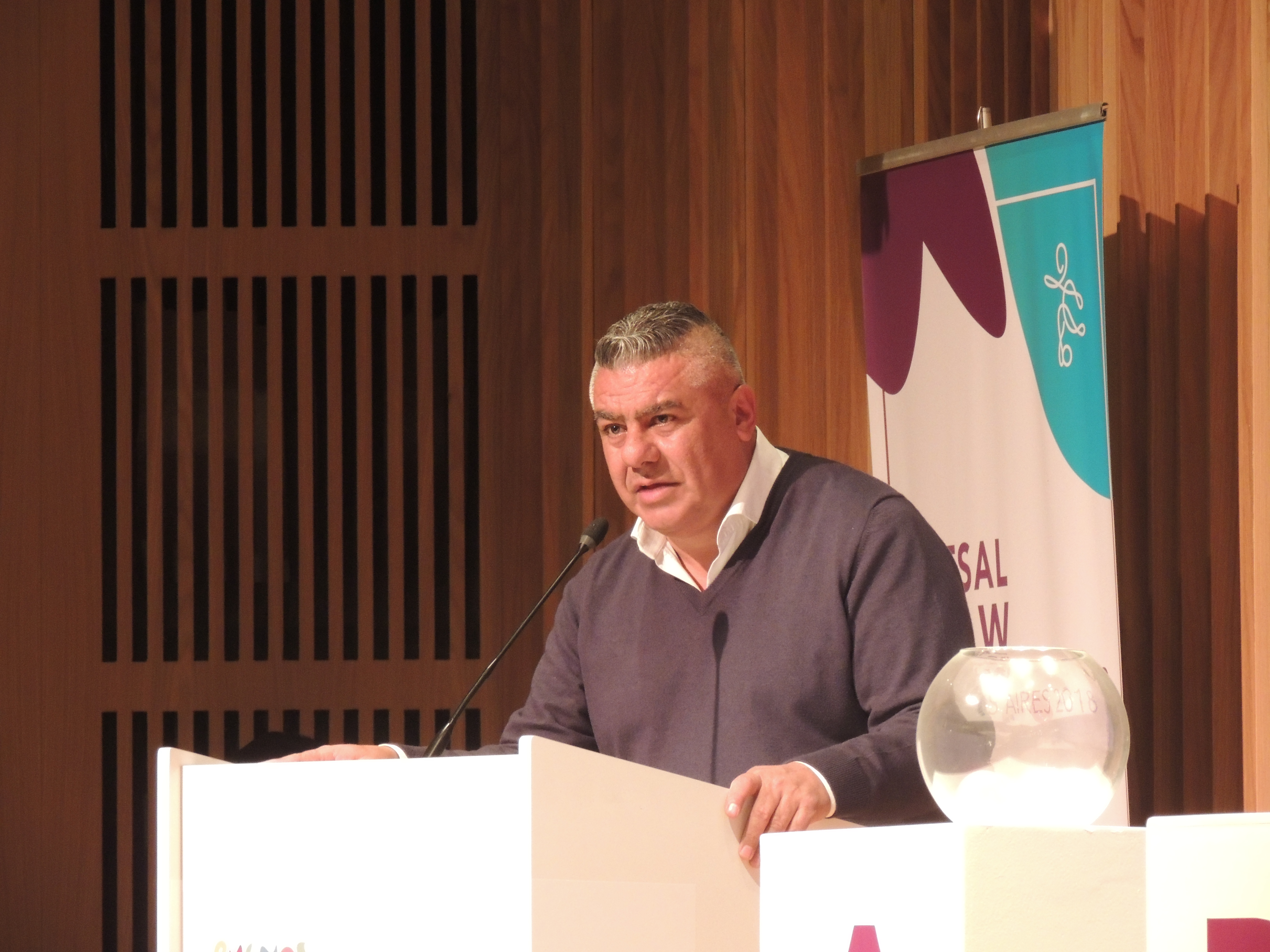 Presidente de la Asociación del Fútbol Argentino